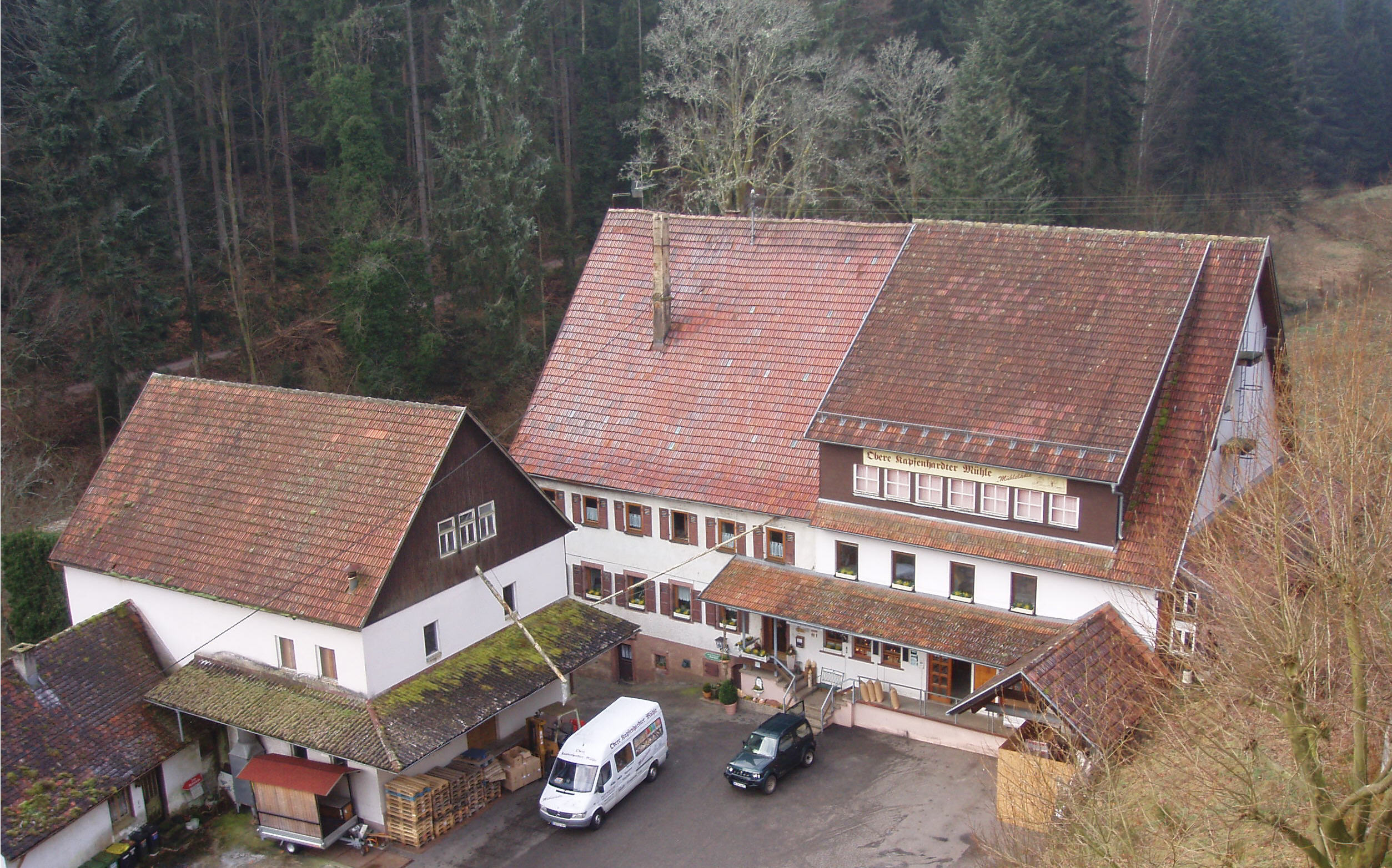 Obere Kapfenhardter Mühle, Laden